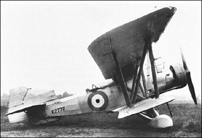 Parnall G.4/31